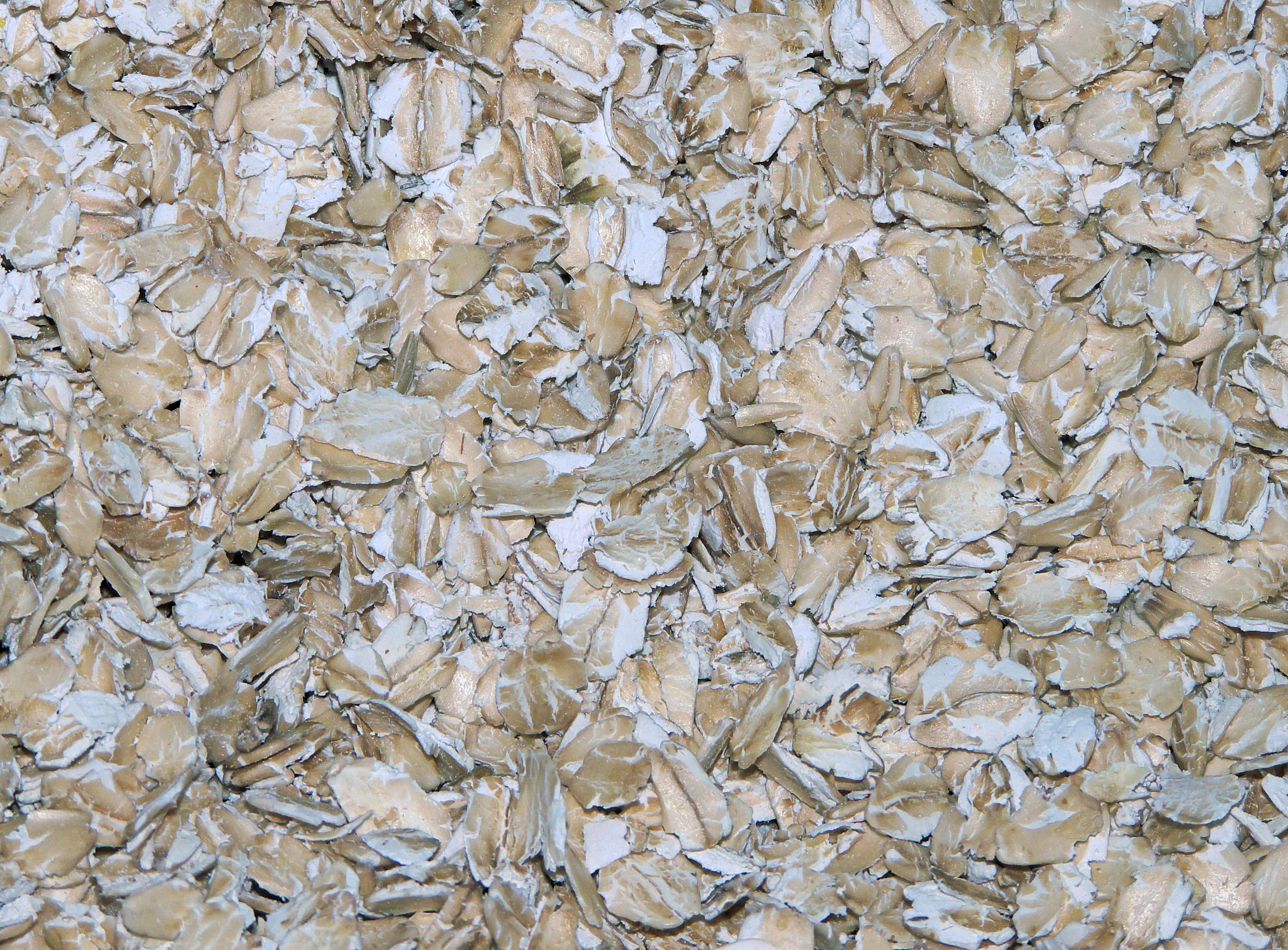 Molen Op Hoop Van Beter, geplette tarwe (crushed wheat)